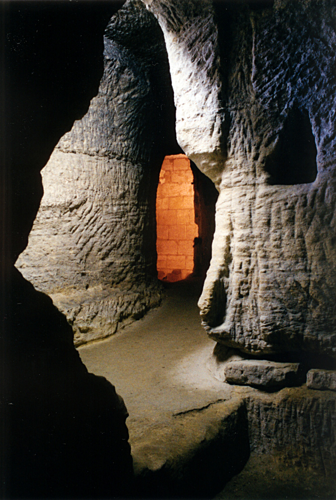 Photo Christophe Lanlignel